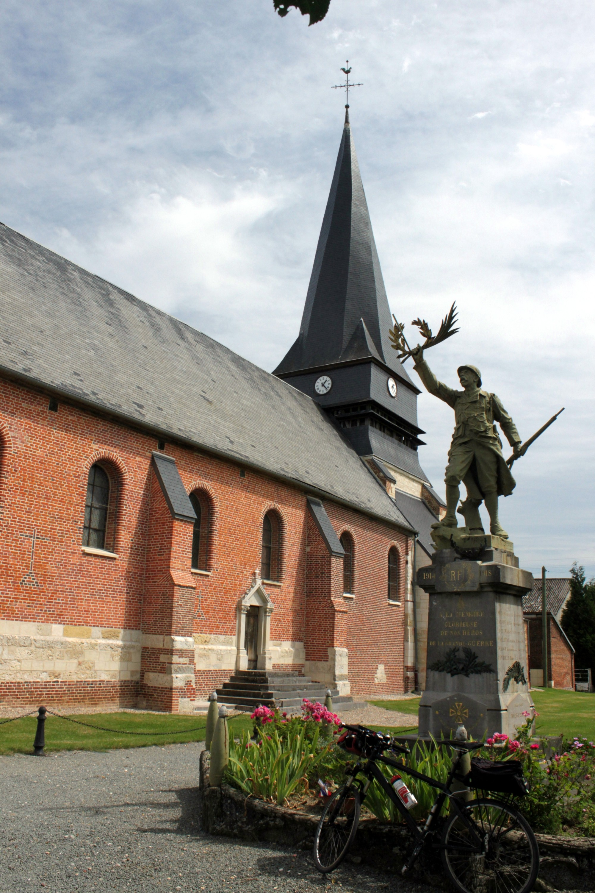 Luchy w departamencie Oise, Francja.